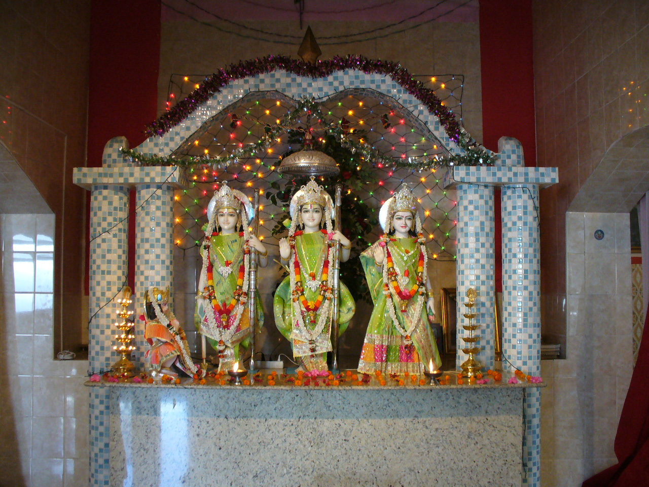 Um dos altares do templo Shree Ram. Salamanga, Moçambique. Hindu temple in Mozambique, Hinduism in Africa.